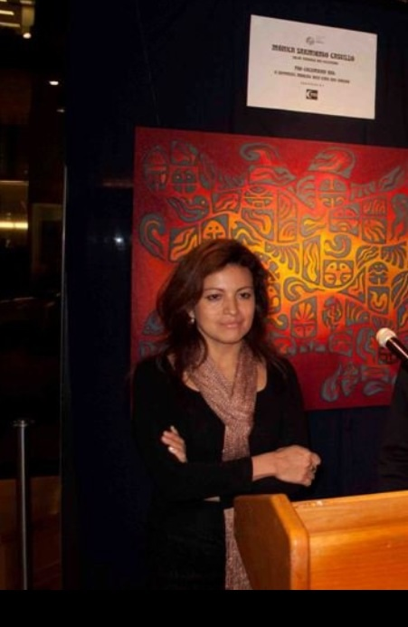 Mónica Sarmiento en una conferencia en NYPL.